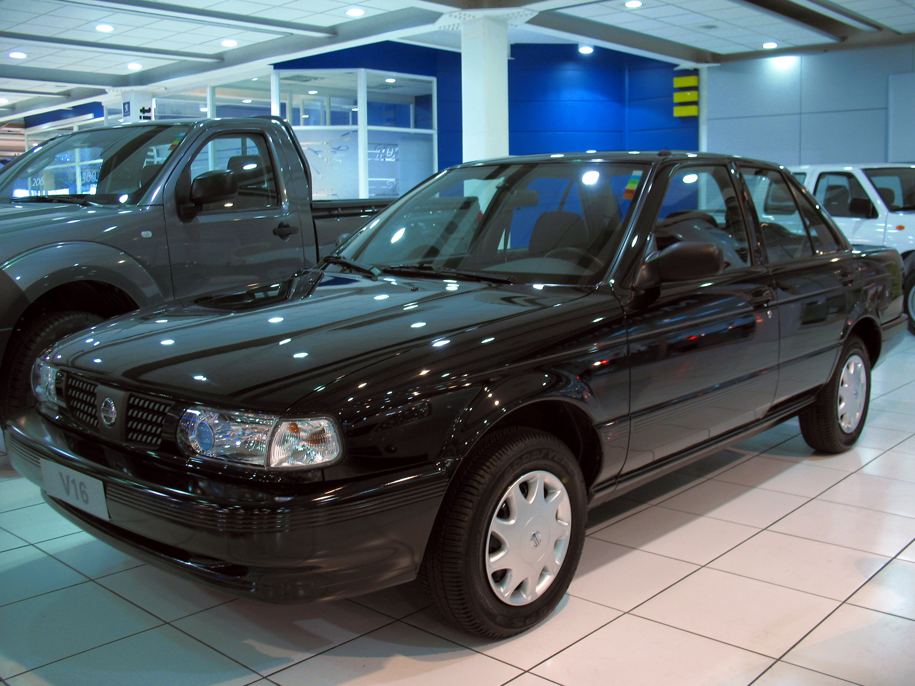 Nissan V16 1.6 2010